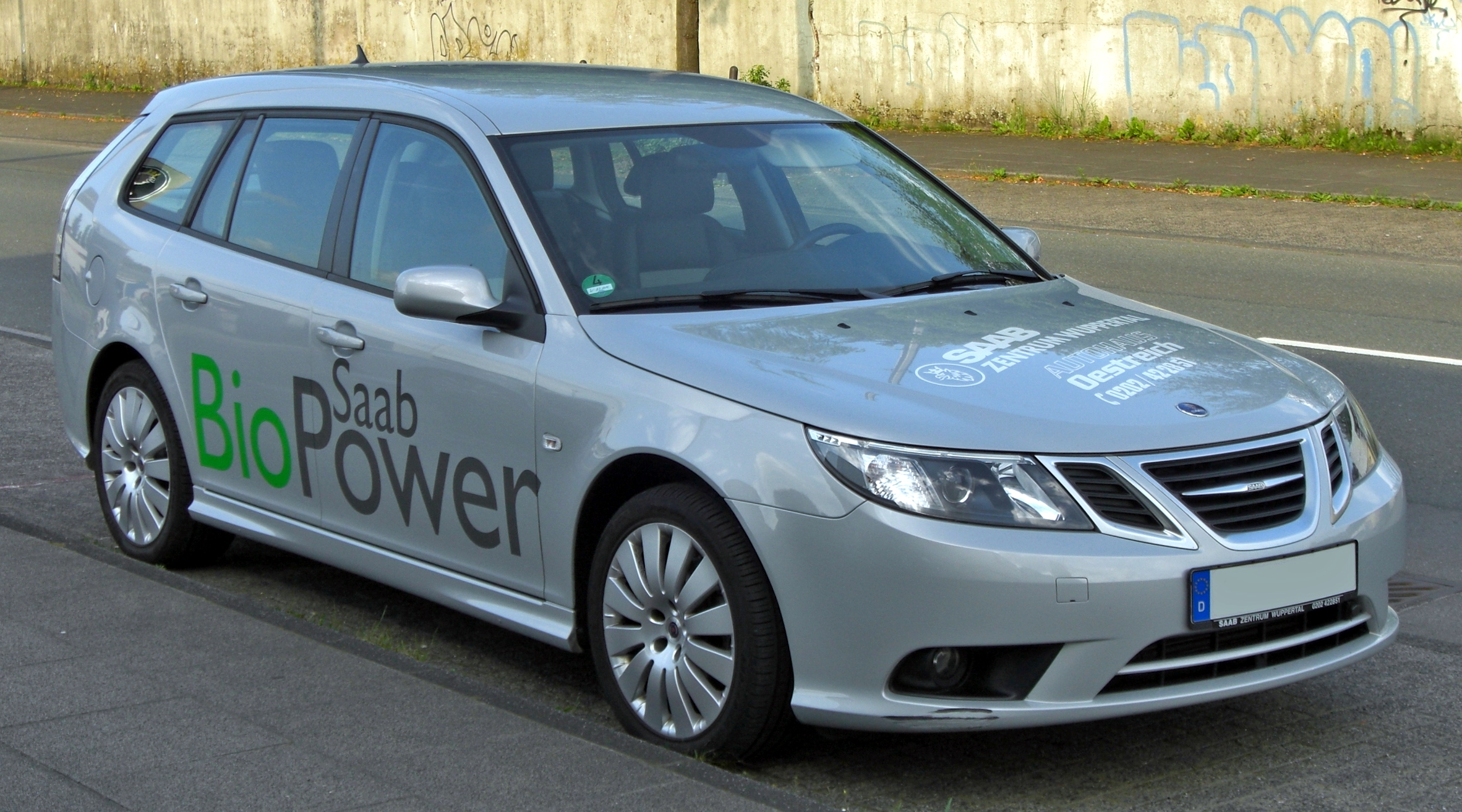 Saab 9-3 SportCombi